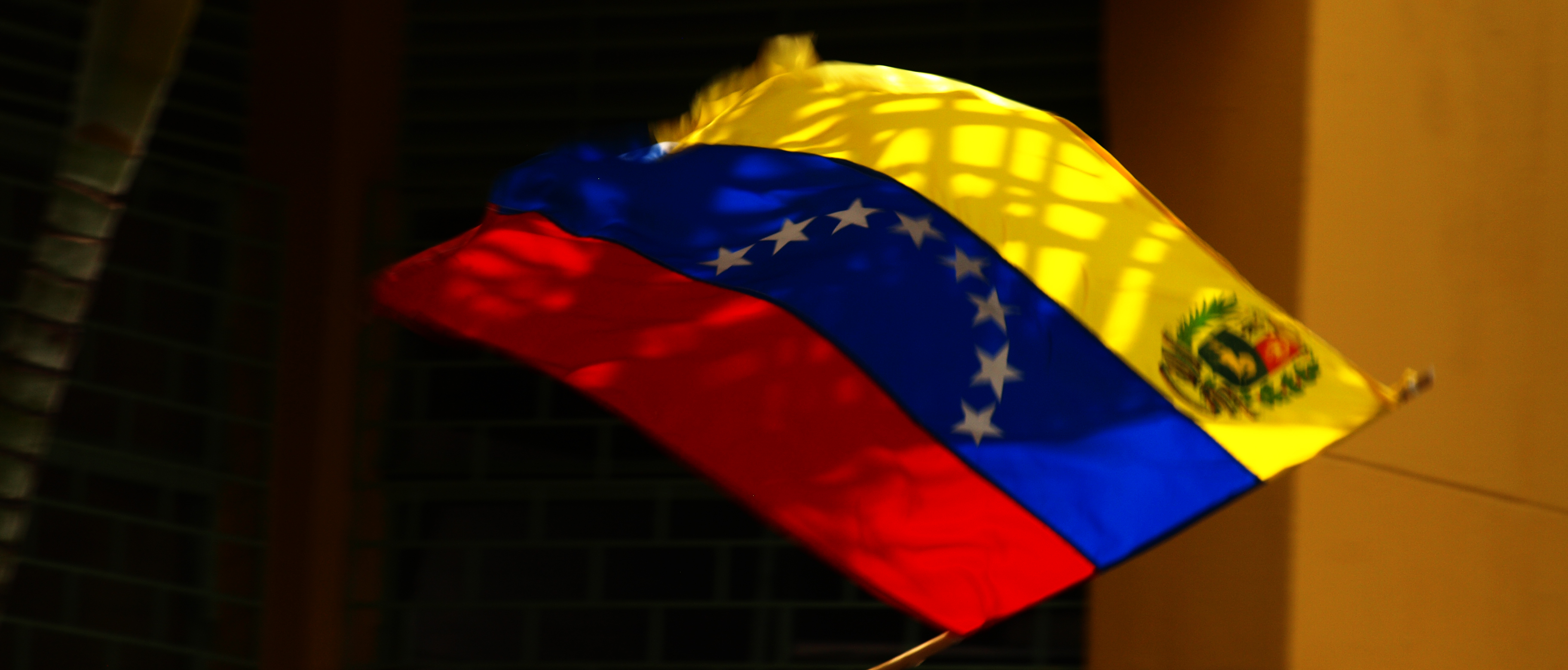 es Bandera de Venezuela en Flag of Venezuela